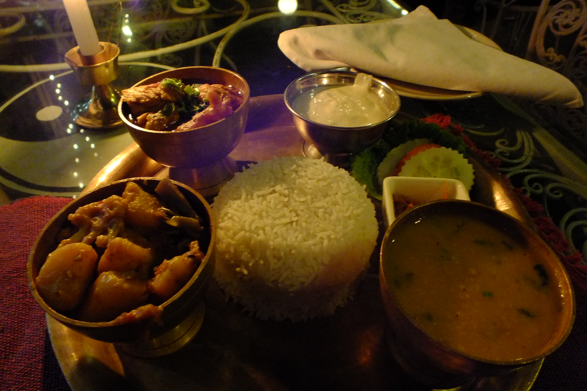 2015-03-09 Dalbath of Yin Yang Restaurant in Thamel, Kathmandu, Nepal ダルバート